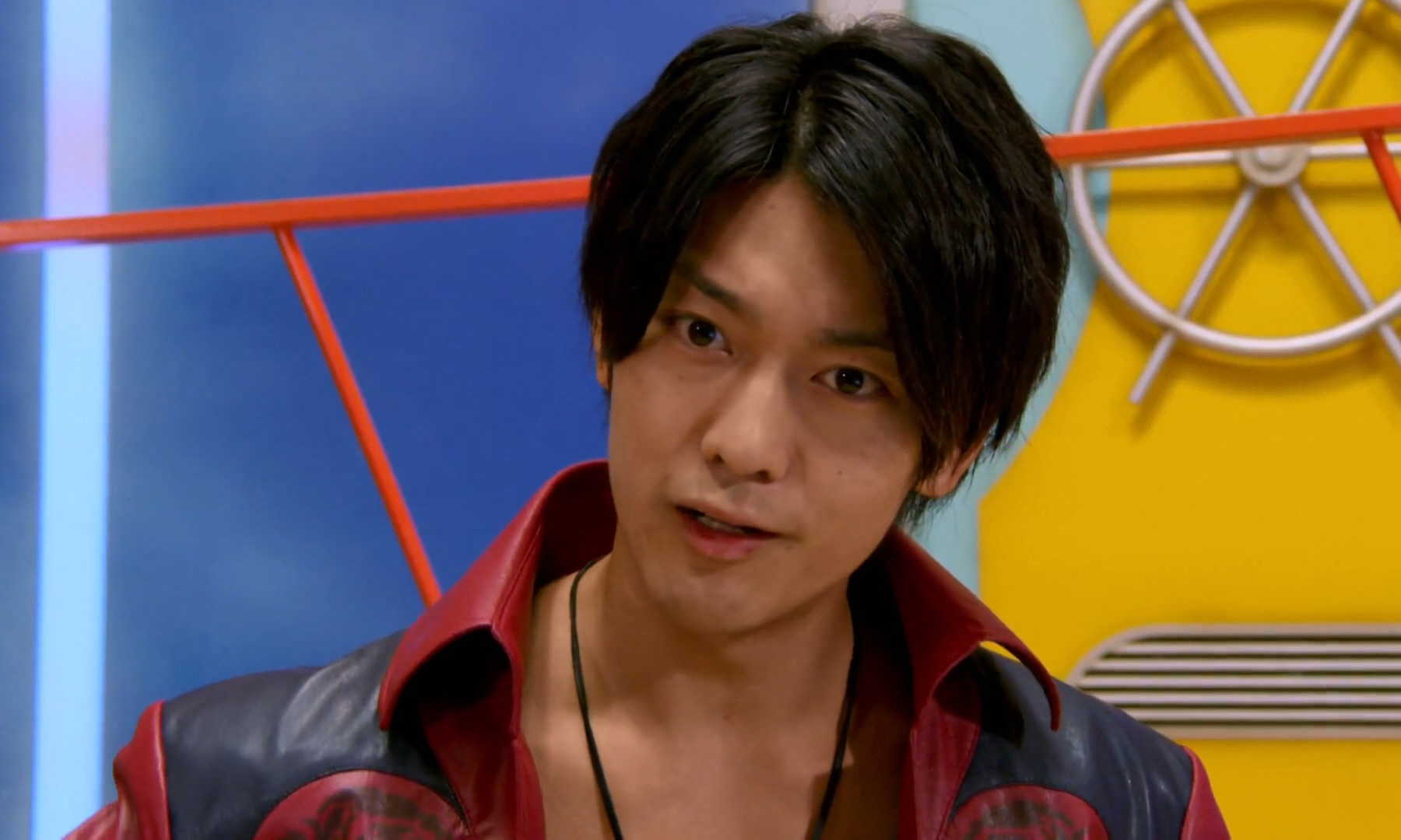 『宇宙戦隊キュウレンジャー 変身講座』スペシャルエピソード